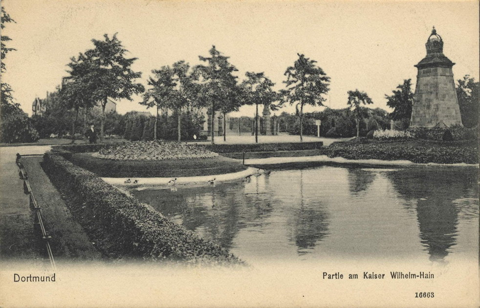 Historische Postkarte, Kaiser Wilhelm Hain